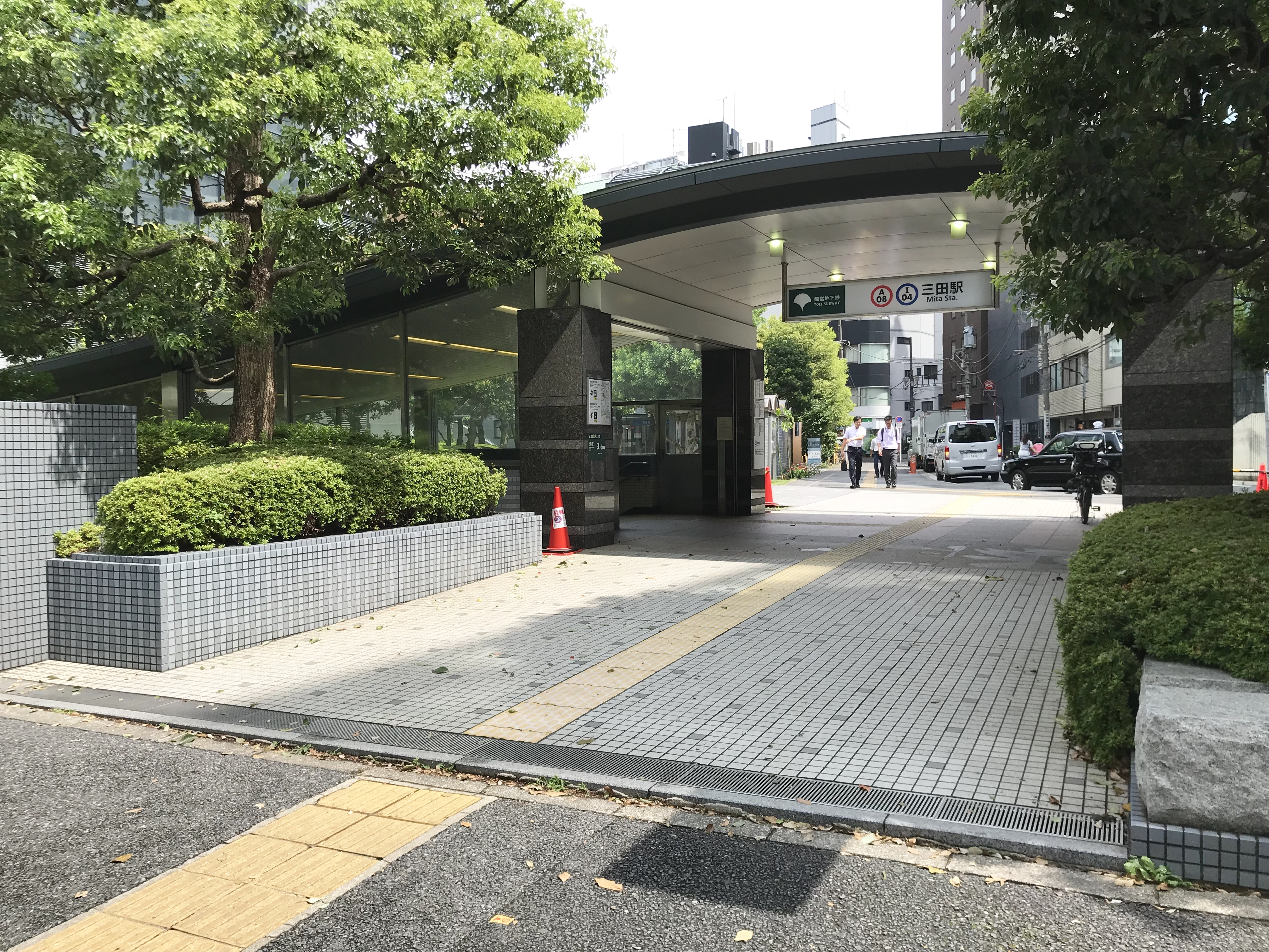 都営地下鉄浅草線・三田線三田駅A9番出入口